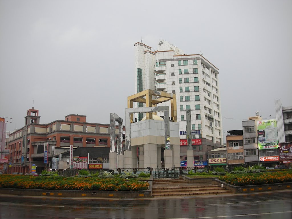 台灣雲林縣斗六市，斗六圓環。